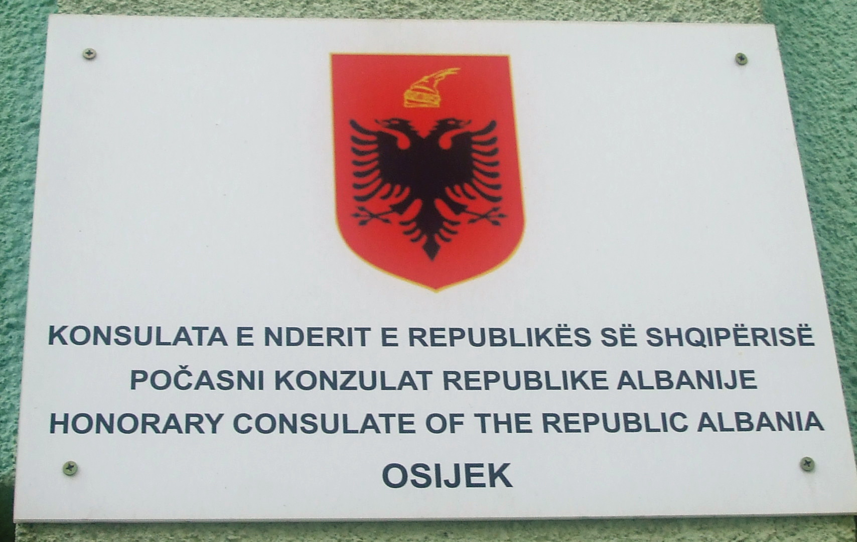 Počasni konzulat Republike Albanije u Osijeku